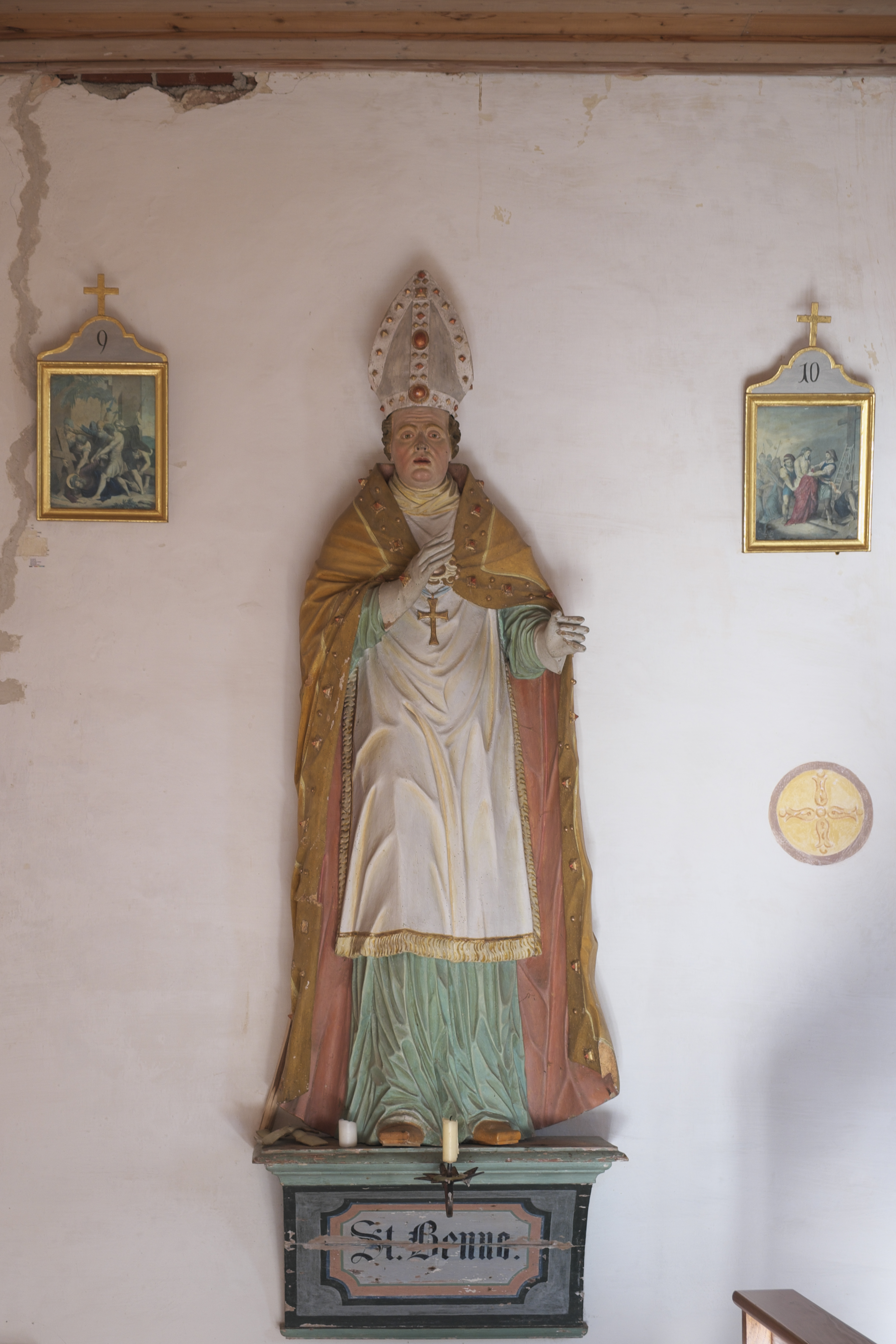 Katholische Filialkirche der Unschuldigen Kinder in Essenbach (Odelzhausen) im Landkreis Dachau (Bayern/Deutschland), heiliger Benno